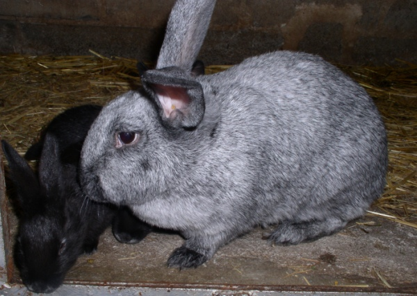 lapin argenté - domaine public (j'ai pris moi même cette photo et je la place dans le domaine public)